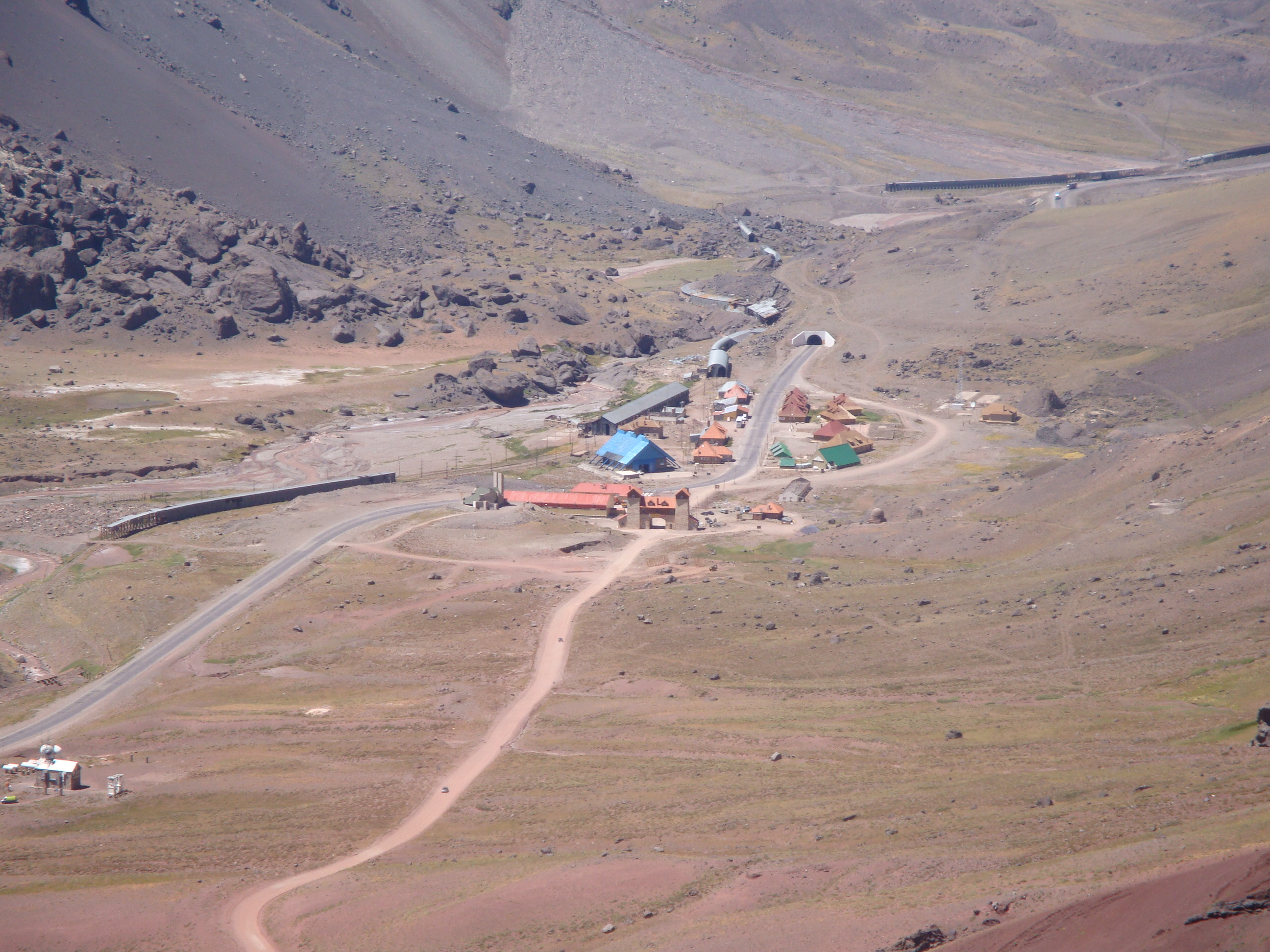 Las Cuevas desde el Camino al Cristo Redentor, en el Departamento Las Heras, Provincia de Mendoza, Argentina. El camino pavimentado es la Ruta Nacional 7 y el de ripio es el que conduce al Cristo Redentor.